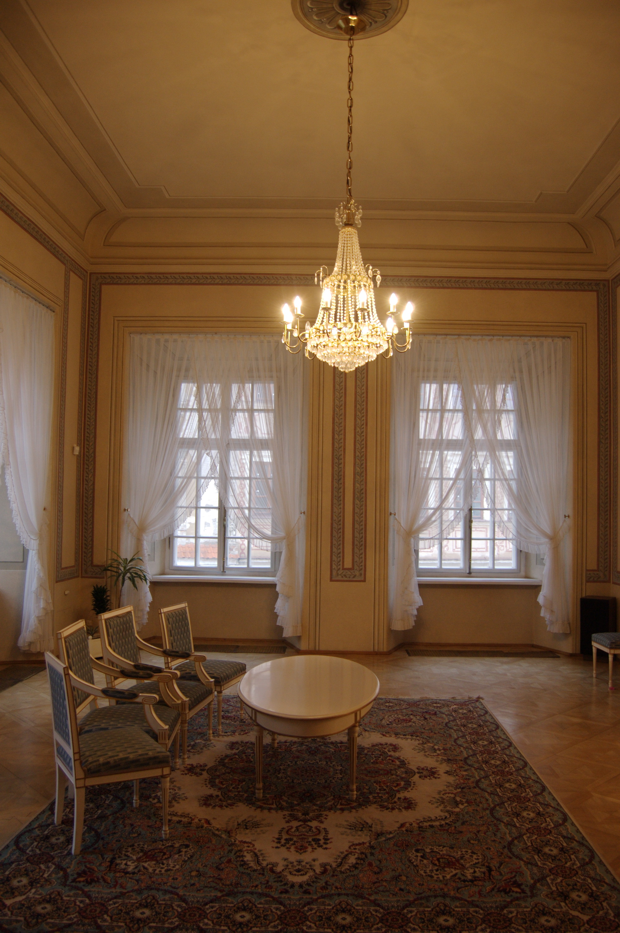 Wnętrze Trybunału Koronnego w Lublinie.